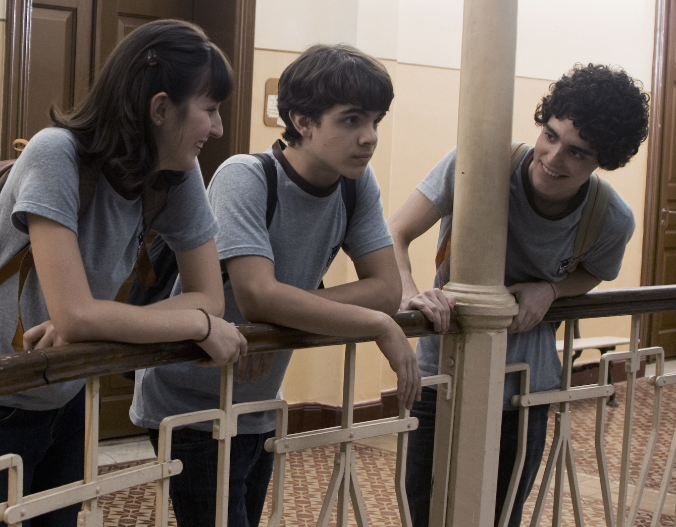 Eu não quero voltar sozinho (No quiero volver solo) es un cortometraje brasileño de 2010 dirigido por Daniel Ribeiro. Reparto Tess Amorim, Fabio Audi Fabio Audi